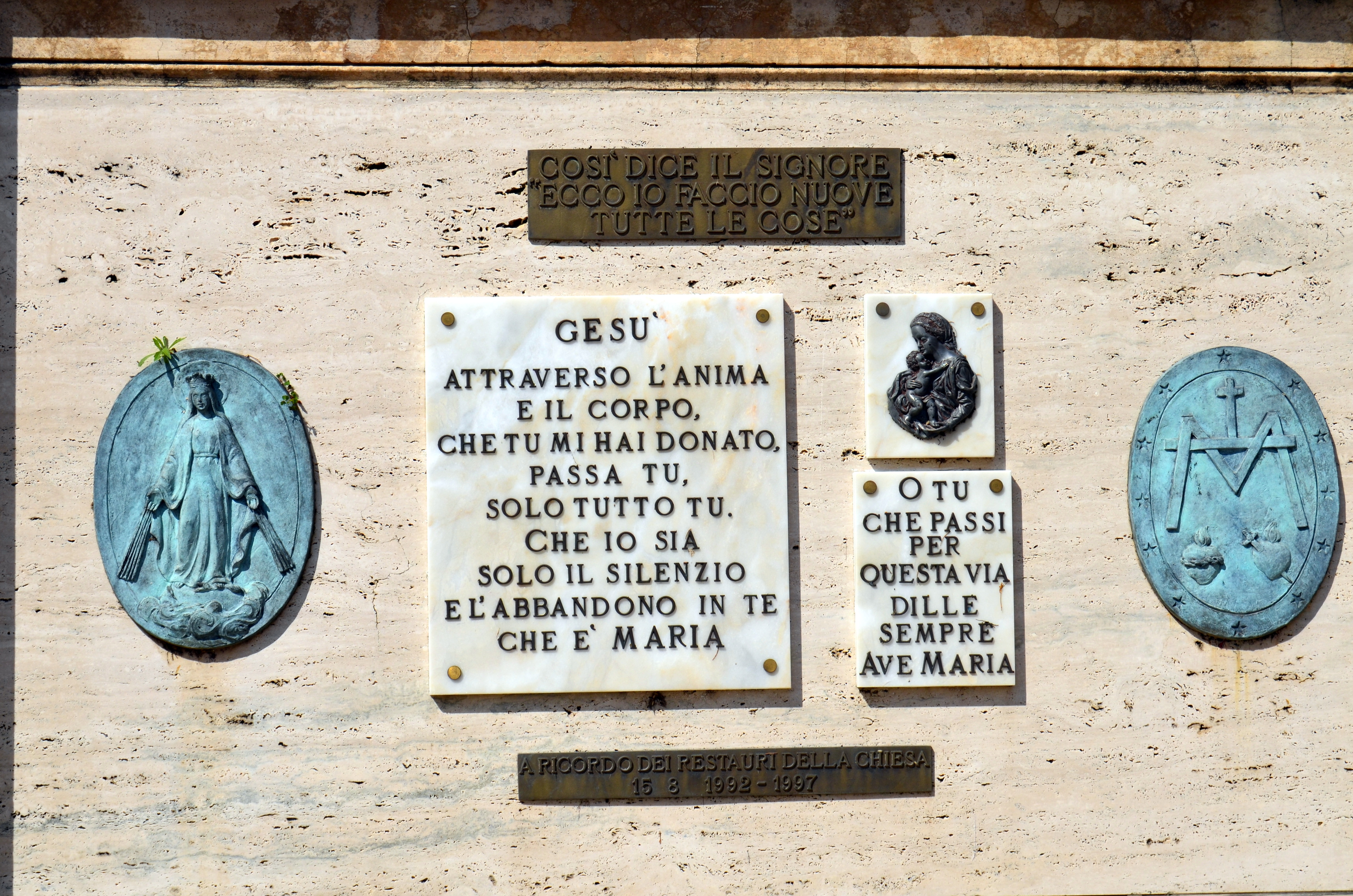 La chiesa di San Pietro apostolo nella frazione di San Pietro di Rovereto, Zoagli, Liguria, Italia